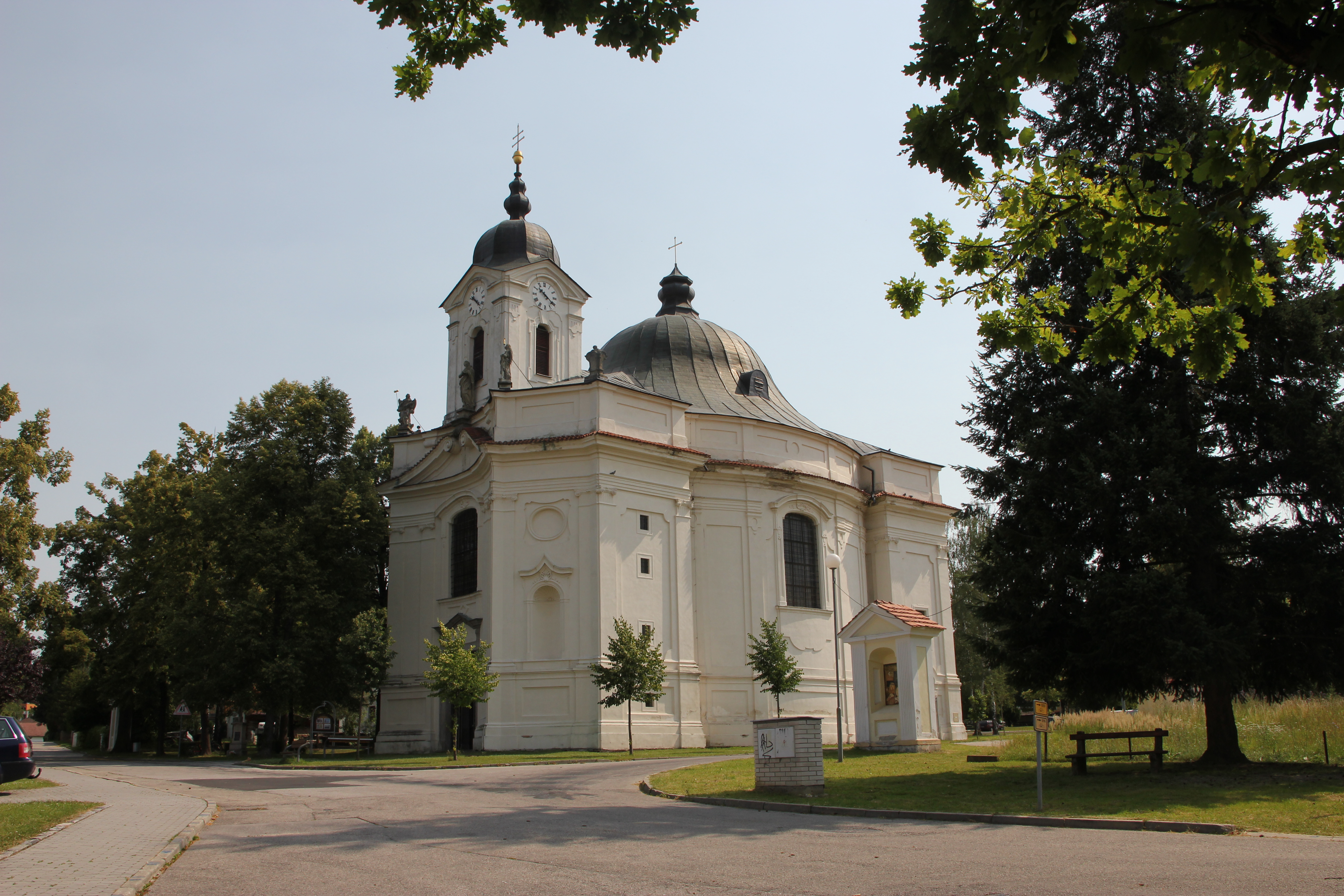 Kostel P. Marie Bolestné (Dobrá Voda u Českých Budějovic)